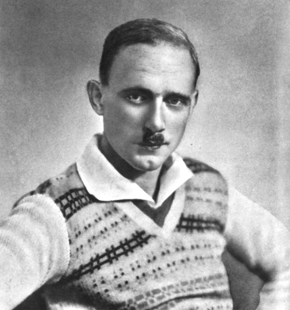 Otto Peltzer (1900–1970)